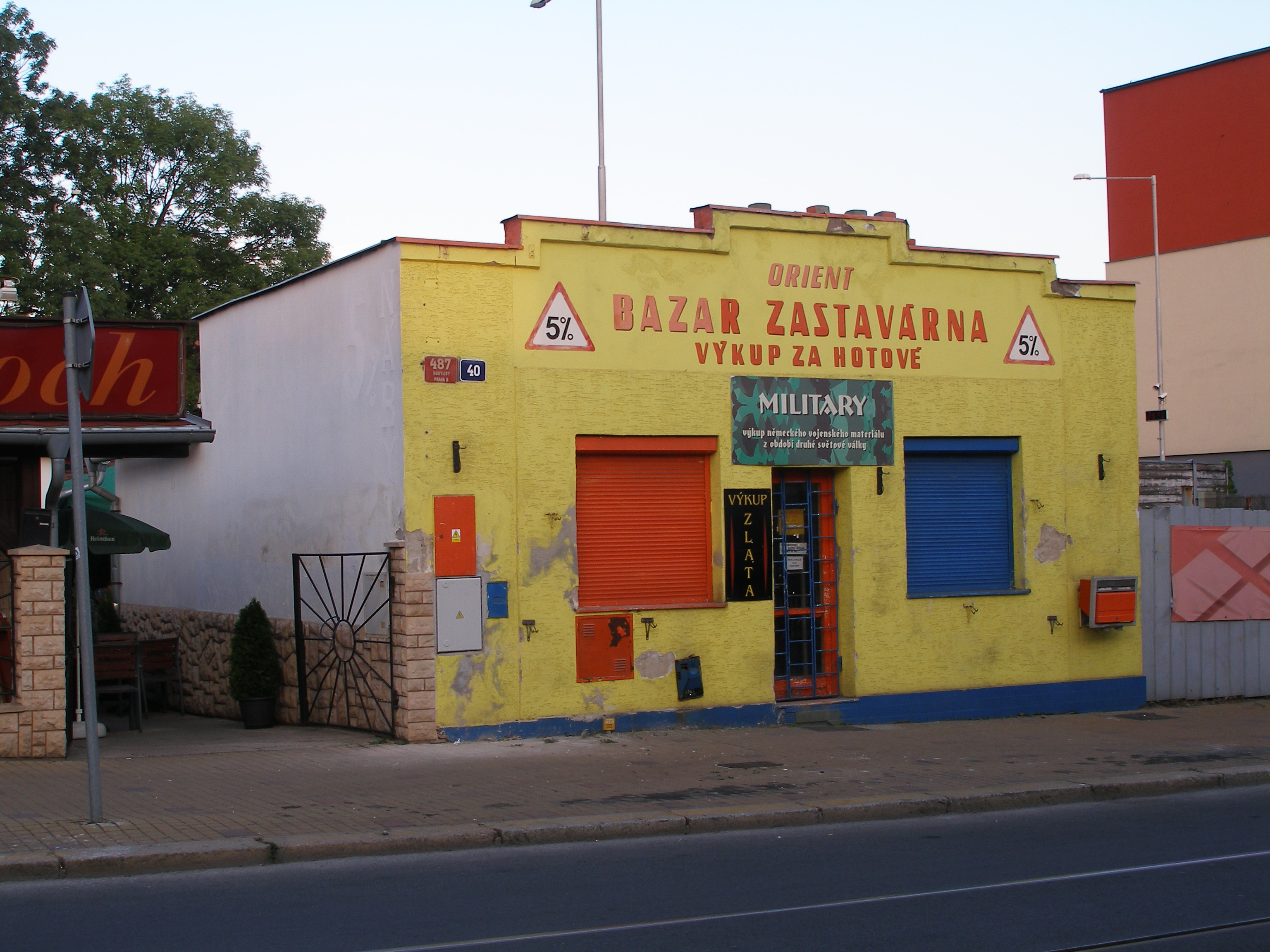 Bývalá modlitebna farního sboru Českobratrské církve evangelické v Praze 8 - Kobylisích na třídě Rudé armády (dnes - 2012 - Klapkova ulice) číslo 487/40.